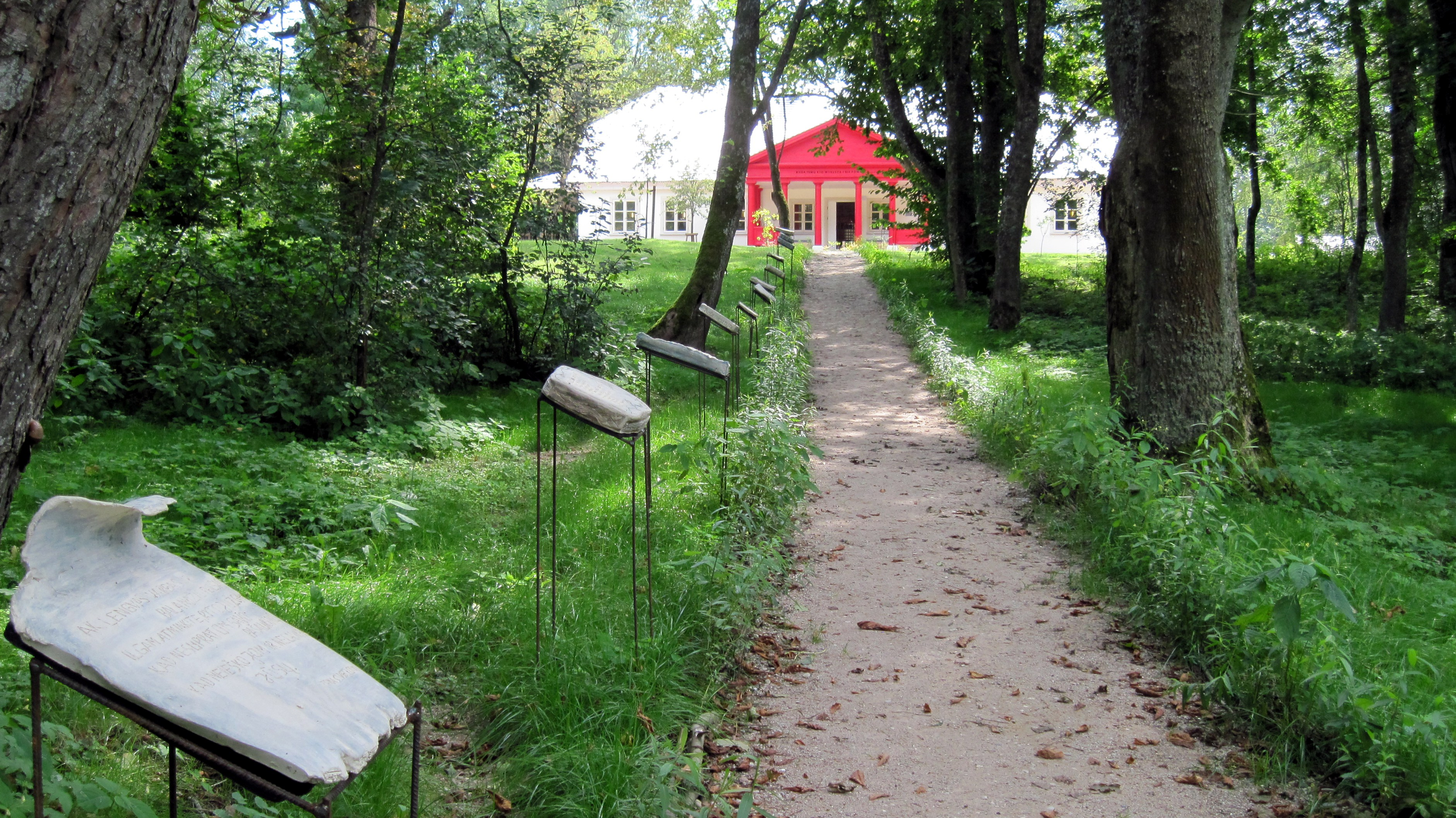 Krasnogruda - park, w zespole dworskim, poł. XIX w. (zabytek nr 454 z 12.03.1986)